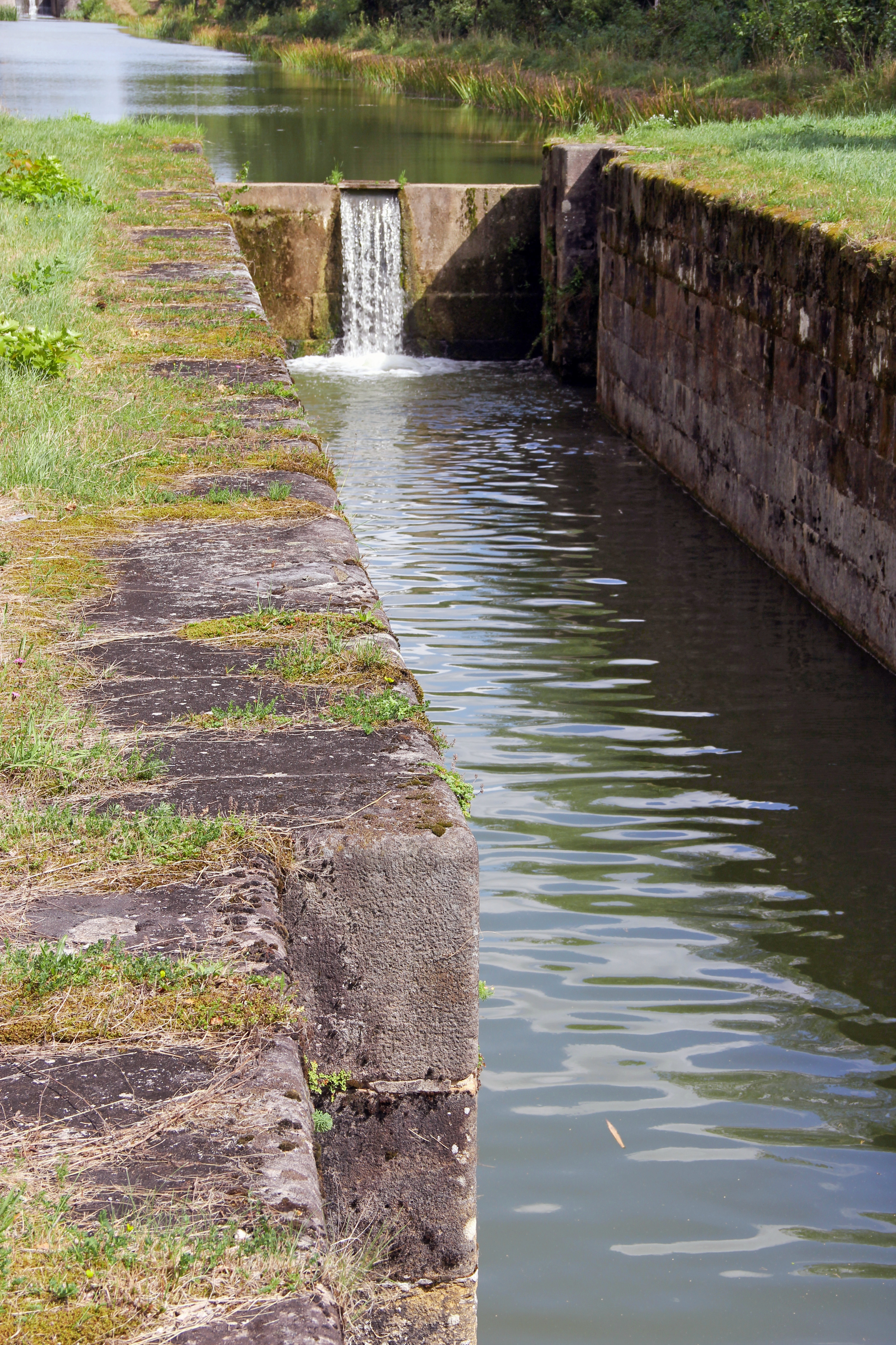 Schleuse 42, Ludwig-Donau-Main-Kanal